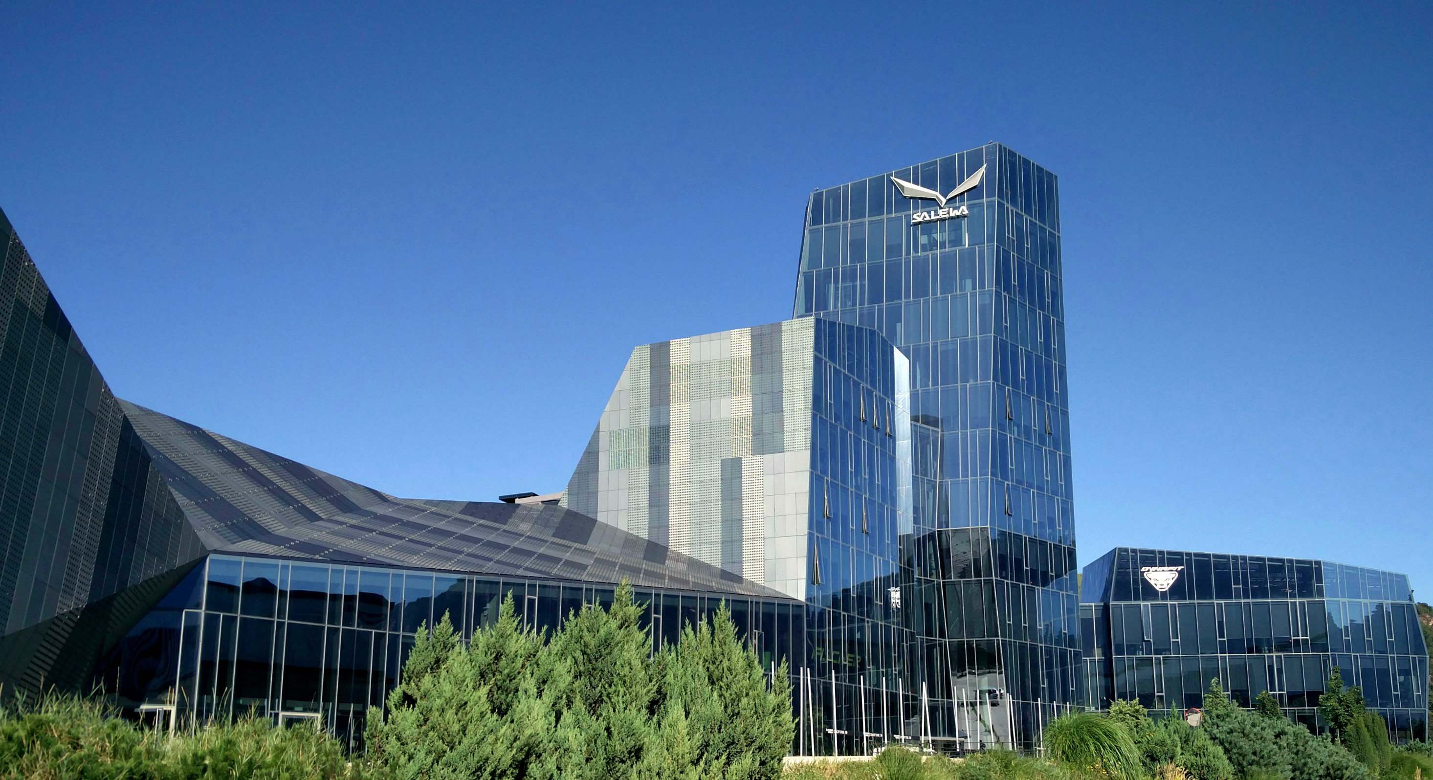 Oberalp Headquarters in Bozen